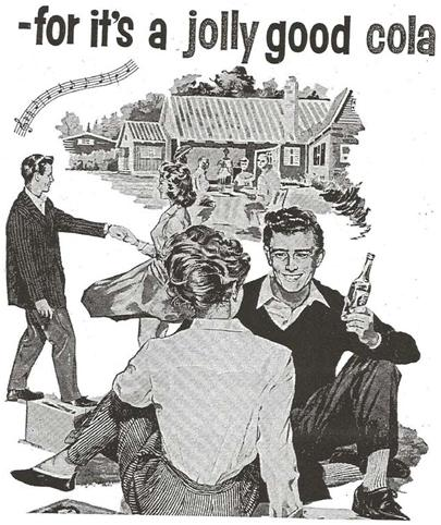 Første Jolly Cola printreklame